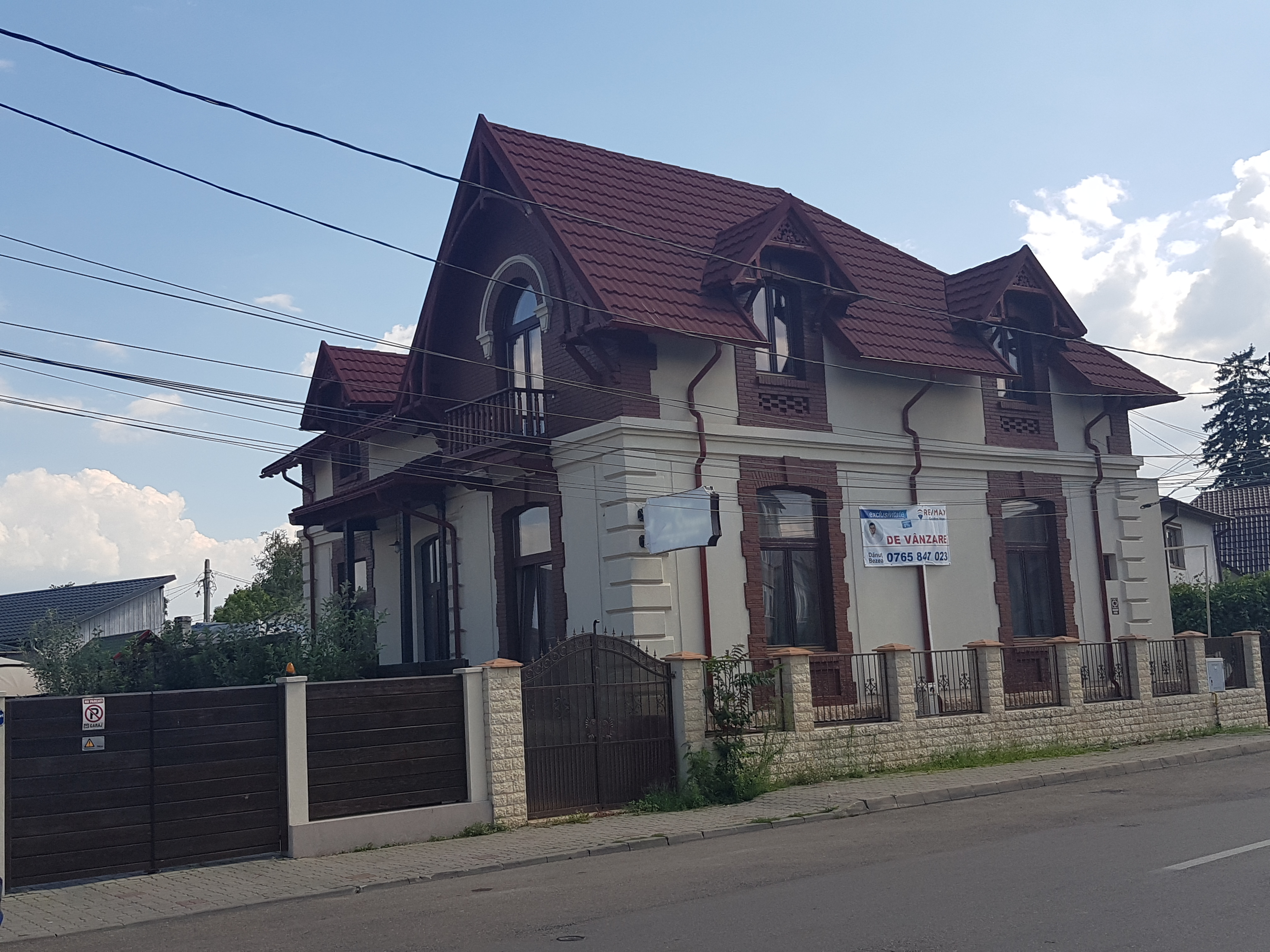 Casa Giurgea